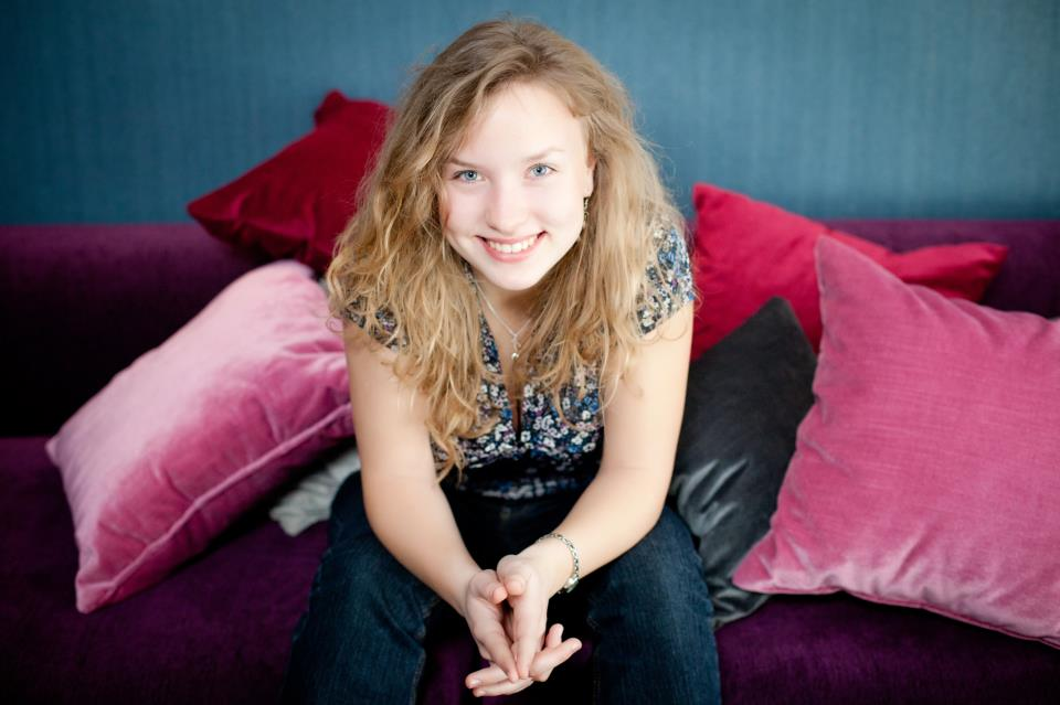 Göncz Renáta énekesnő